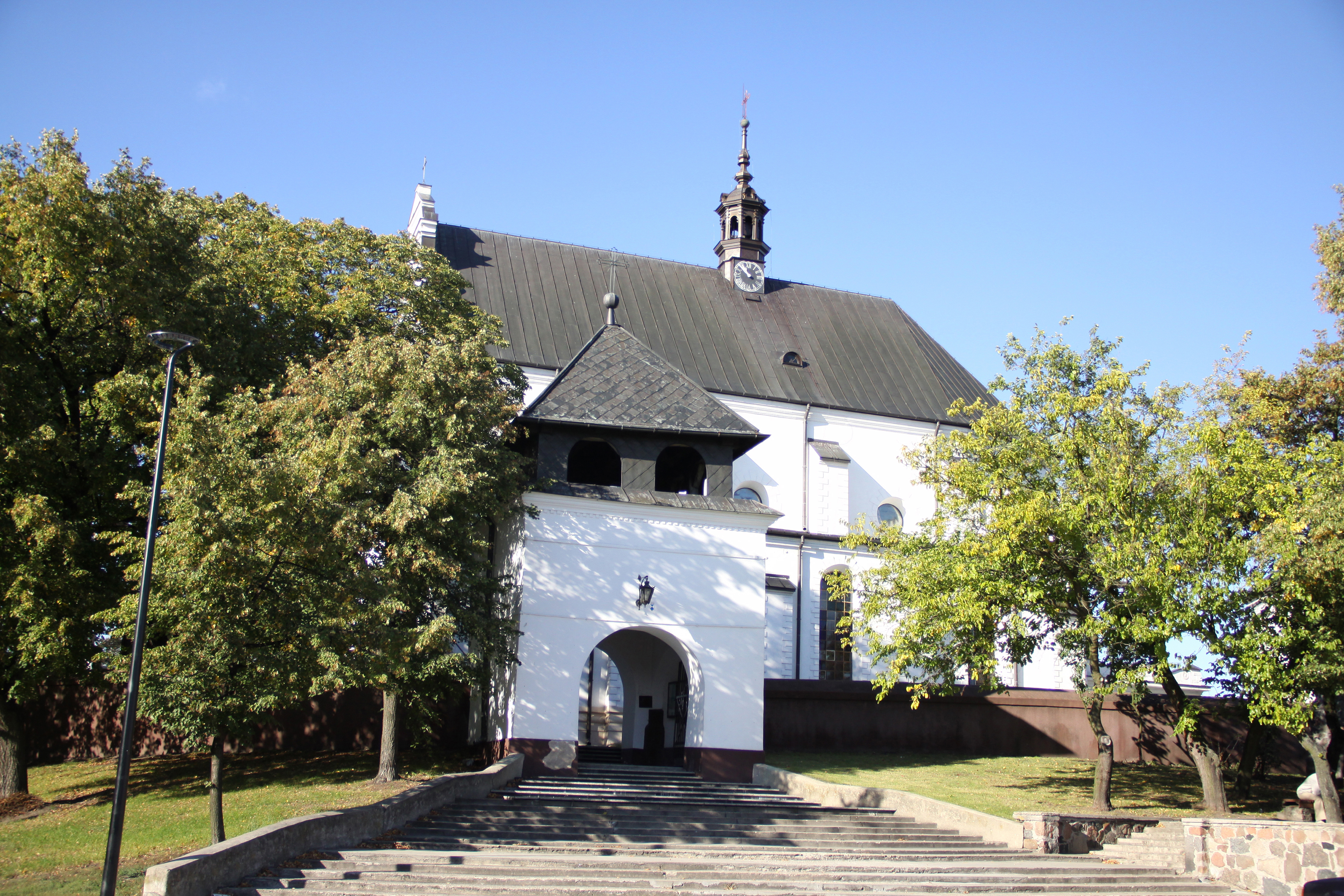 Poddębice - kościół pw.św.Katarzyny Dziewicy i Męczennicy